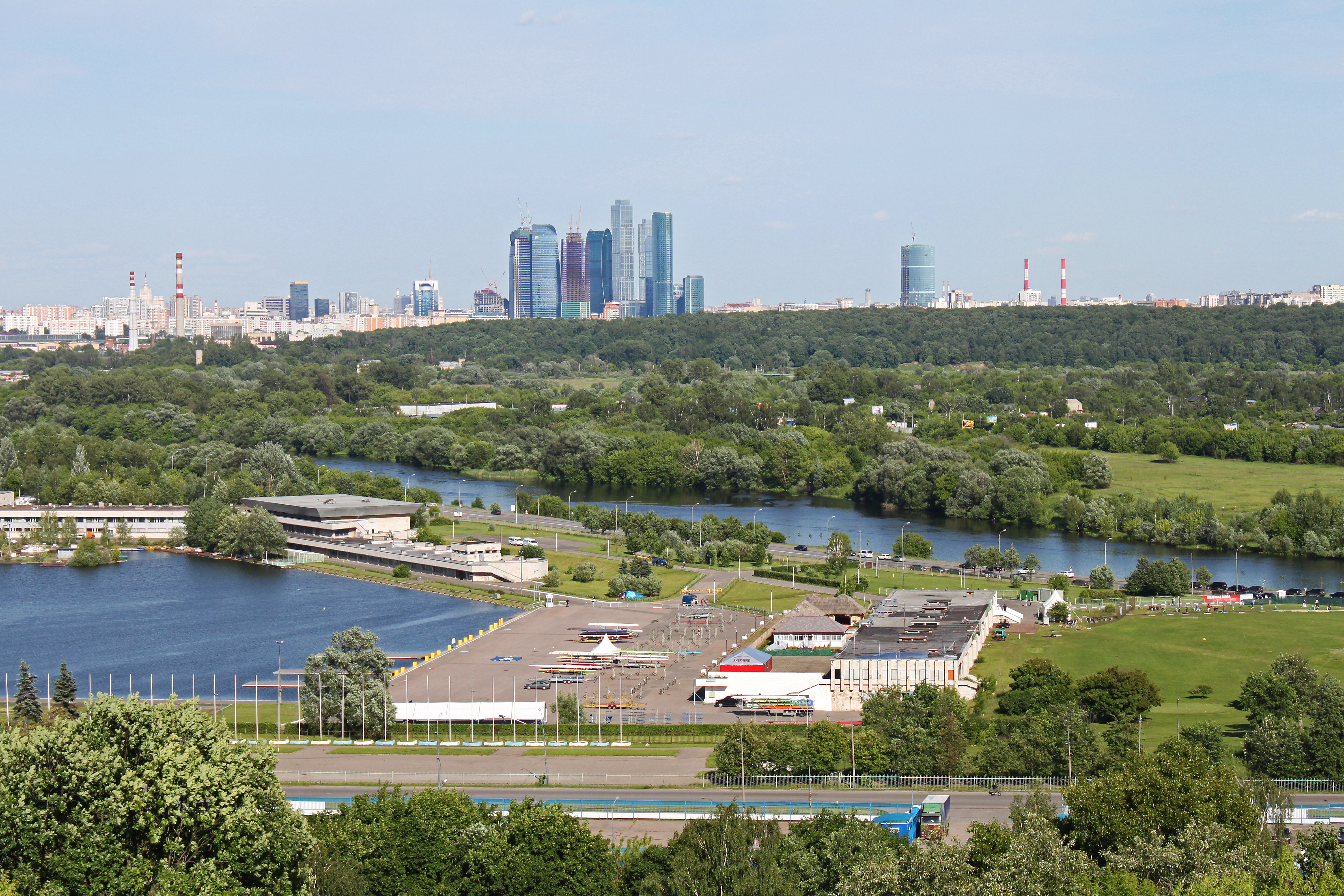 На переднем плане Крылатская улица, Гребной канал, Островная улица, Москва-река, на заднем - Москва-Сити